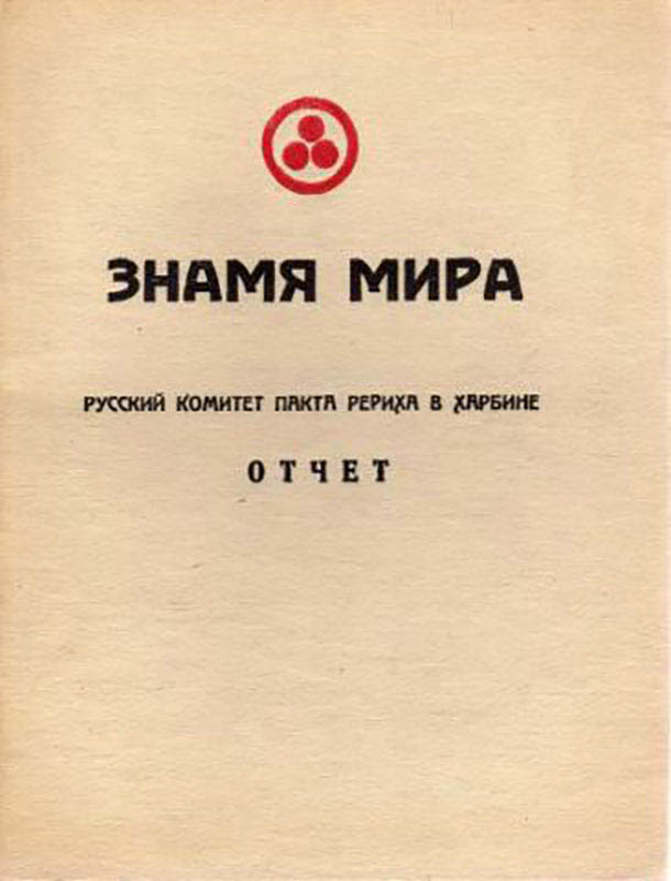 Обложка «Знамя Мира. Русский комитет Пакта Рериха в Харбине. Отчёт» (Харбин, 1934)